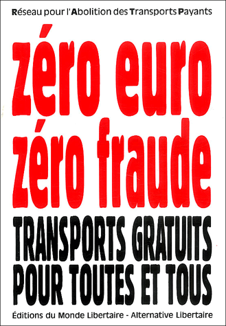 Réseau pour l'abolition des transports payants, Zéro euro = Zéro fraude Transports gratuits pour toutes et tous, Éditions du Monde libertaire et Éditions Alternative Libertaire, 2001